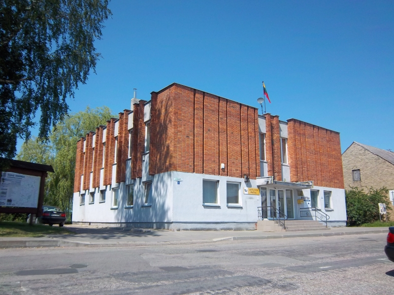 Žaslių seniūnija ir paštas